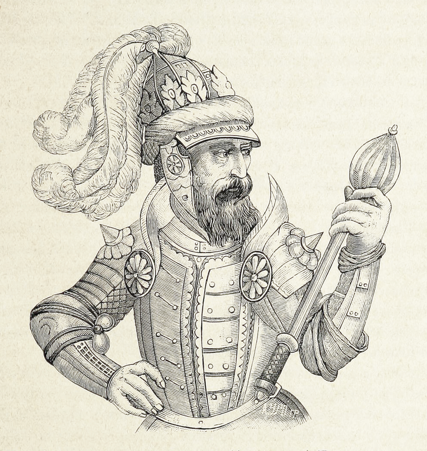 Беларуская (тарашкевіца): Уяўны партрэт вялікага князя Альгерда (Algierd)